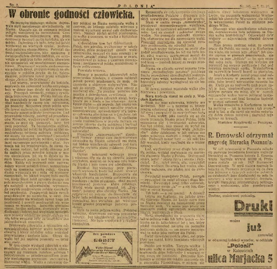 Stanisław Krzyżowski, W obronie godności człowieka, „Polonia” z 7 listopada 1927, nr 306, s. 2